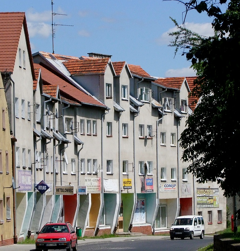 miasto (ośrodek historyczny), nr rej.: A/896/353 z 25.11.1956